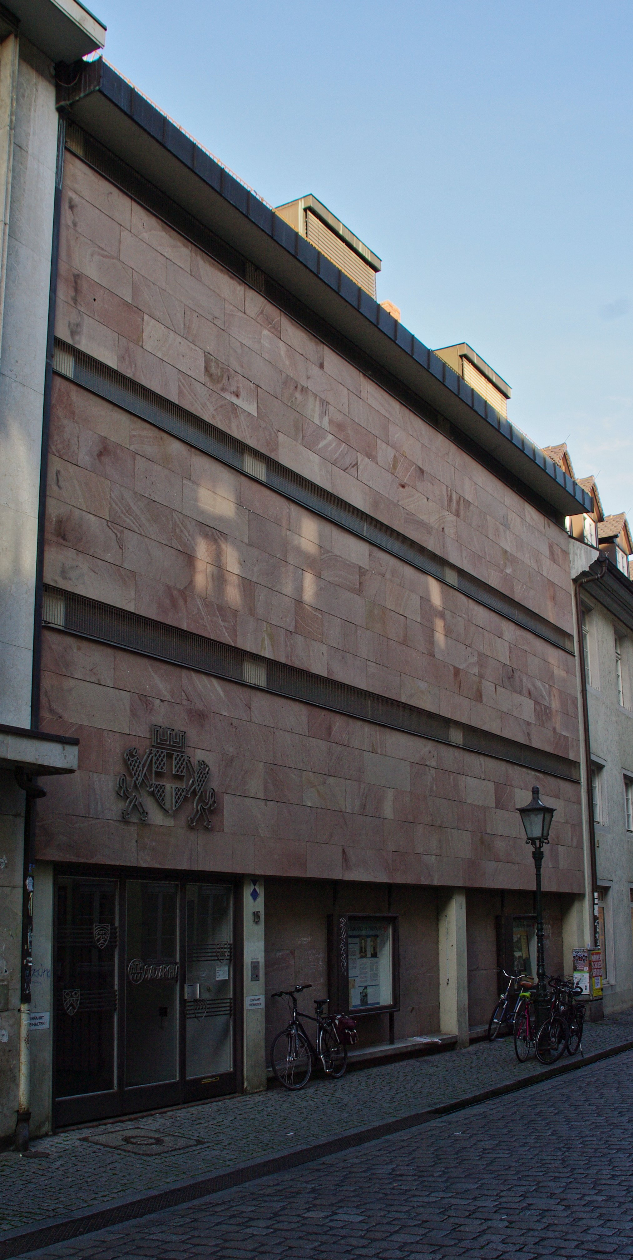 Das Gebäude des Stadtarchivs in der Grünwälderstraße